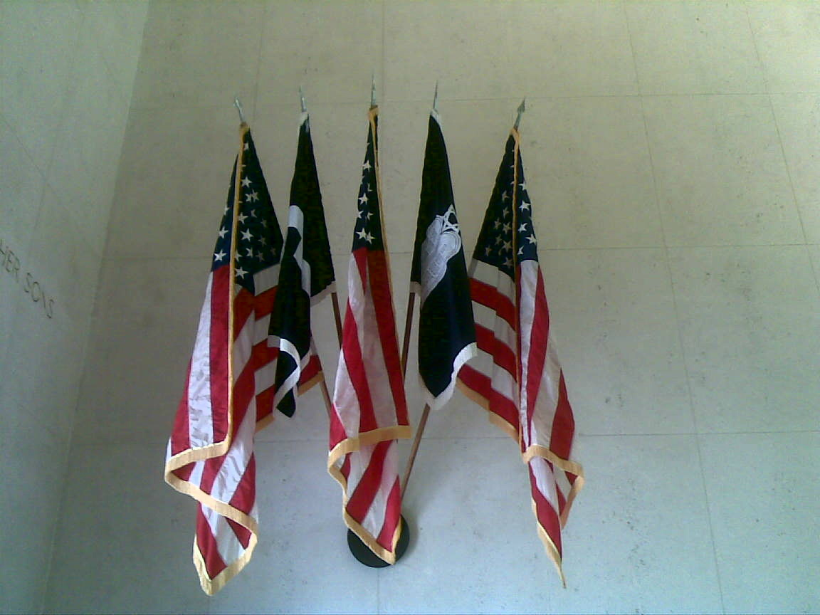 Netherlands American Cemetery, Nationalflaggen und Kirchenfahnen